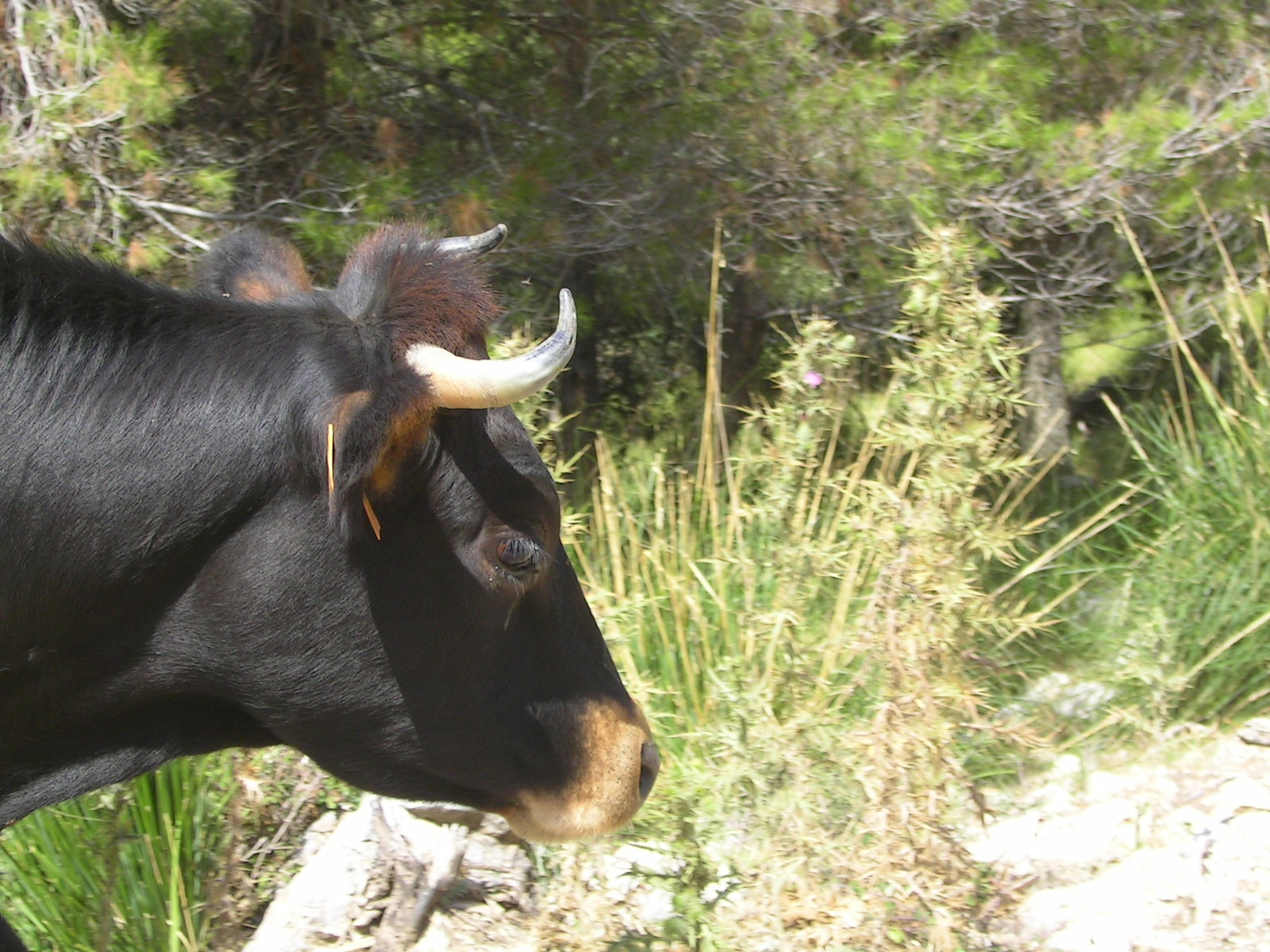 Vaca prop de l'embassament de Cúber, Mallorca.